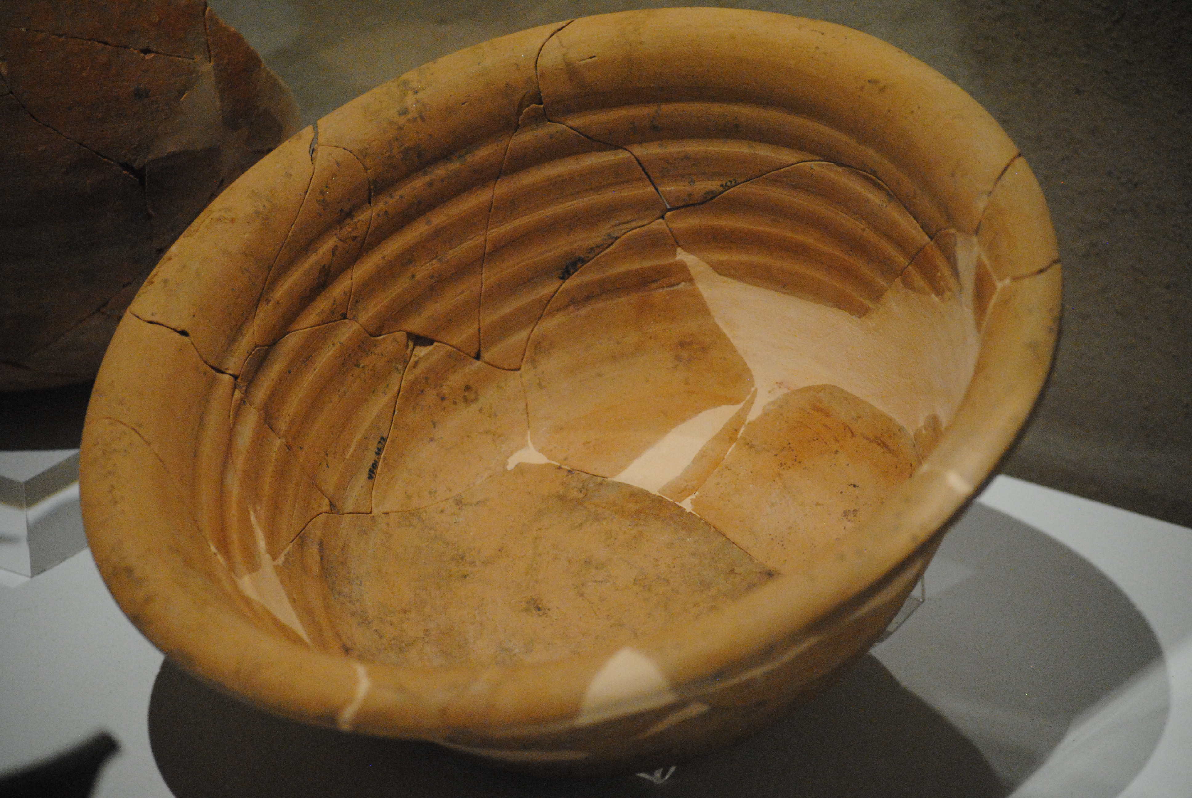 Catino privo di rivestimento (acromo), depurato, risalente alla prima metà del XII secolo (recuperato dallo scavo presso il vicolo dei Facchini, Pisa) - Museo Nazionale di San Matteo.